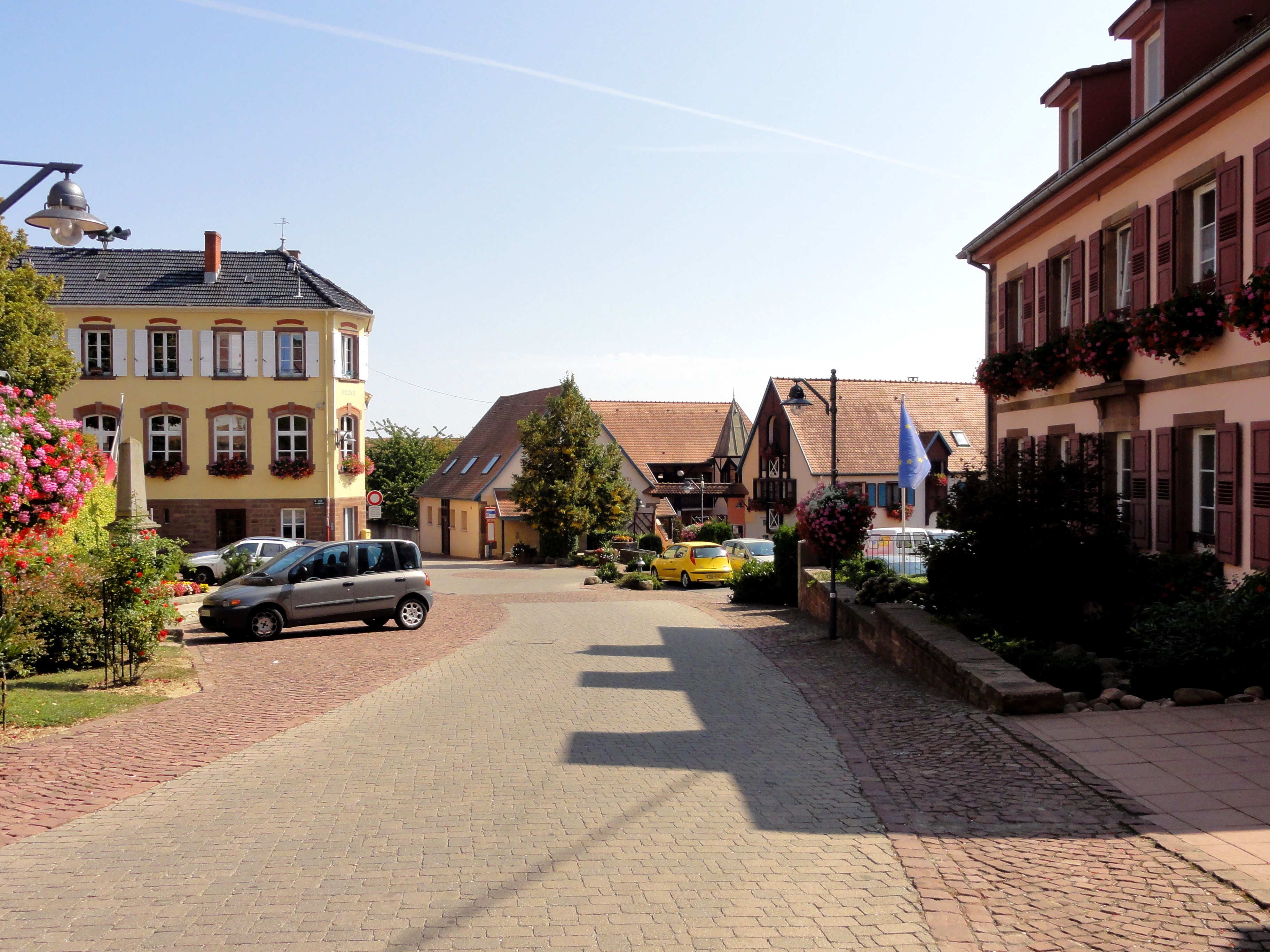 Alsace, Bas-Rhin, Nordheim, Place de la Mairie.